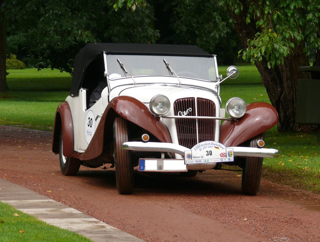 Aero 30 Roadster